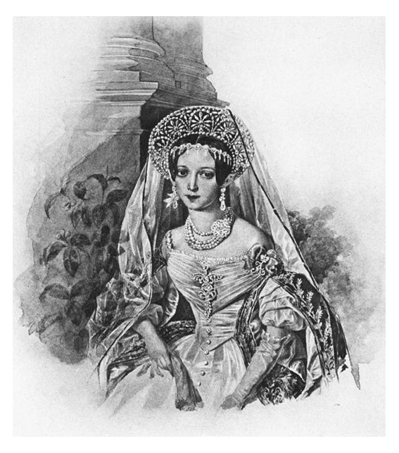 Анна Михайловна Бороздина (1819-1883), фрейлина; с 1839 года Анна Михайловна Раевская жена Н.Н. Раевского-младшего.